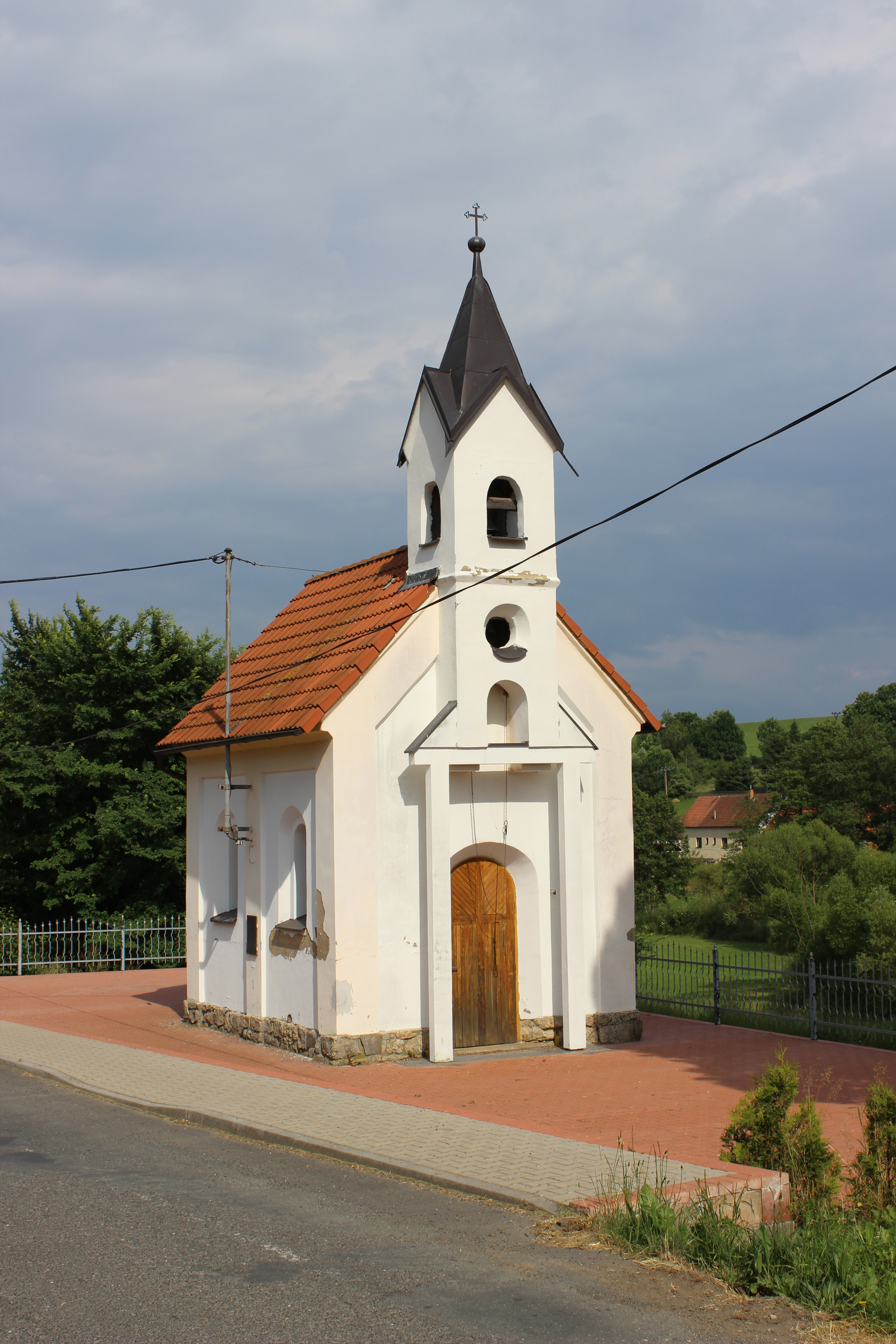 Kaplička ve Strojeticích (pohled od západu).